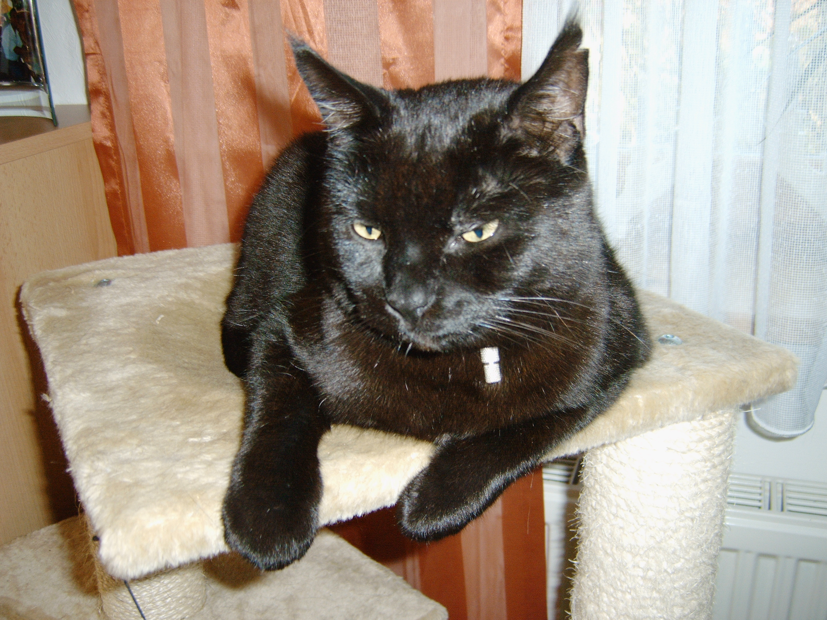 Bombay-Kater